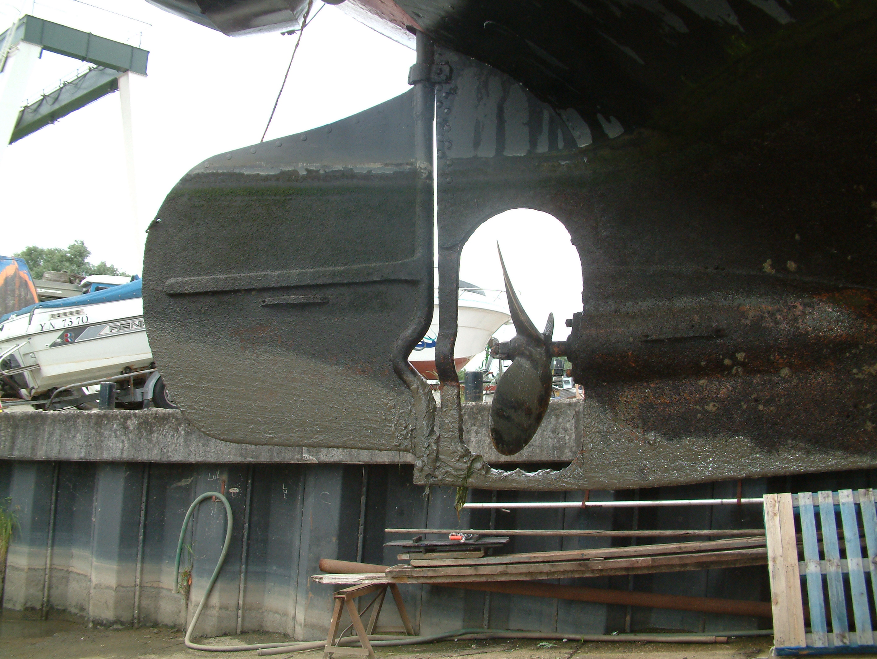 De hak onderaan het schroefraam, met de roerkoning en de schroef